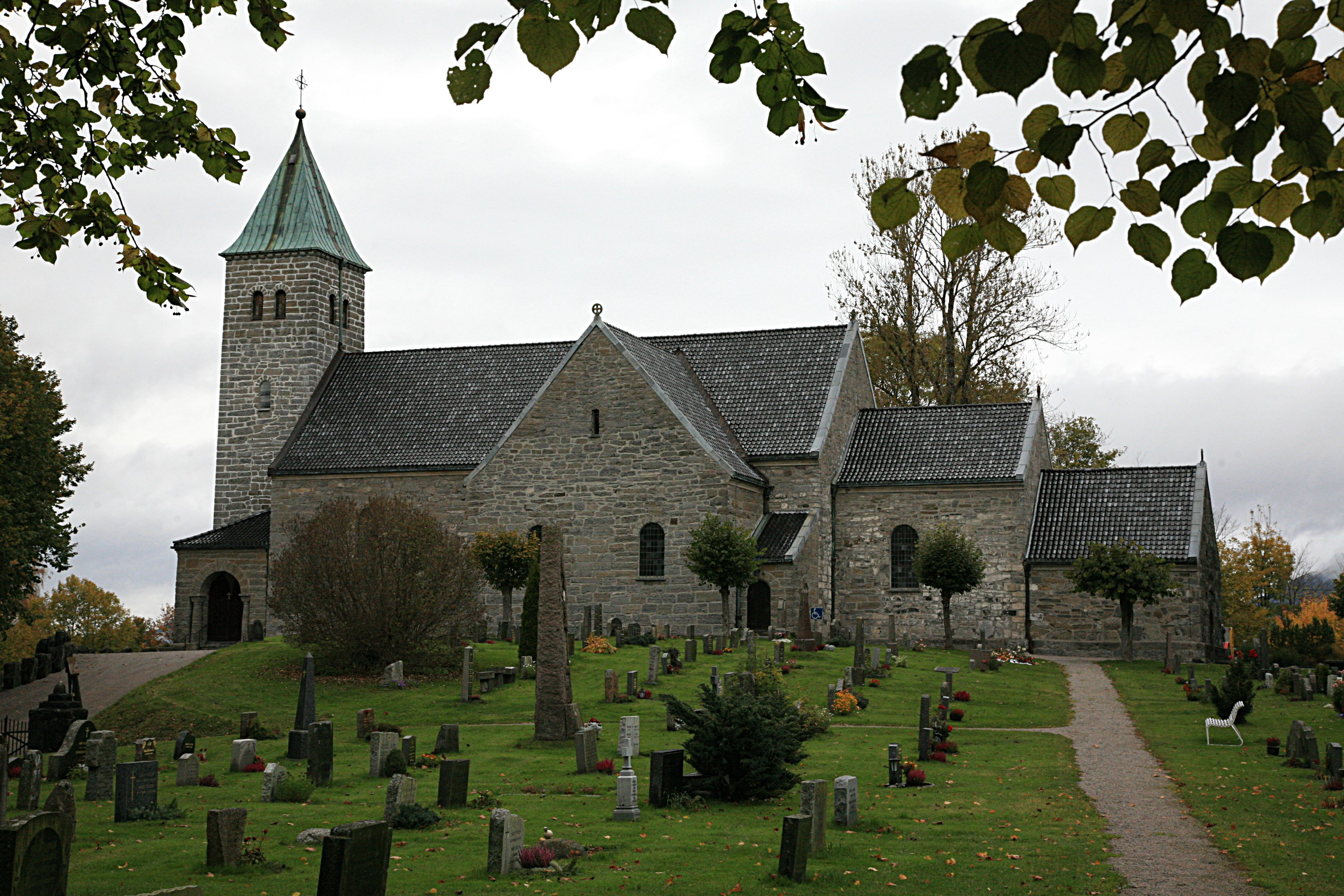 Gjerpen kirke. A church in Skien, Telemark, Norway.